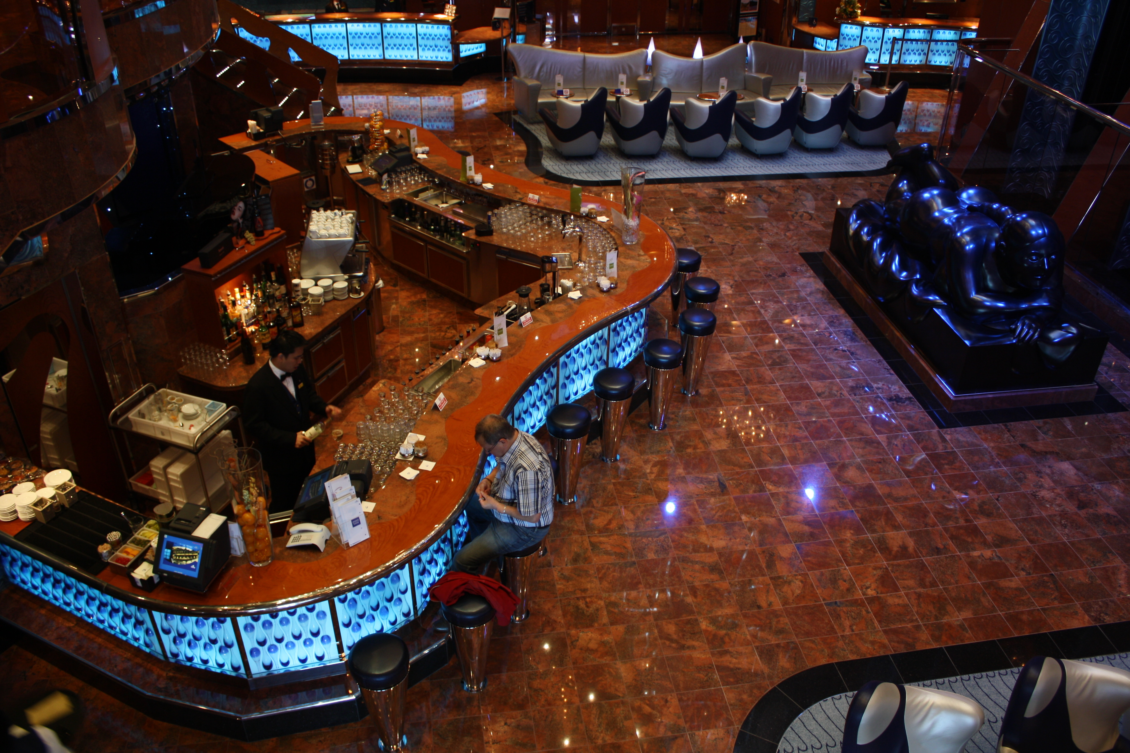 Bar om bord Costa Luminosa.